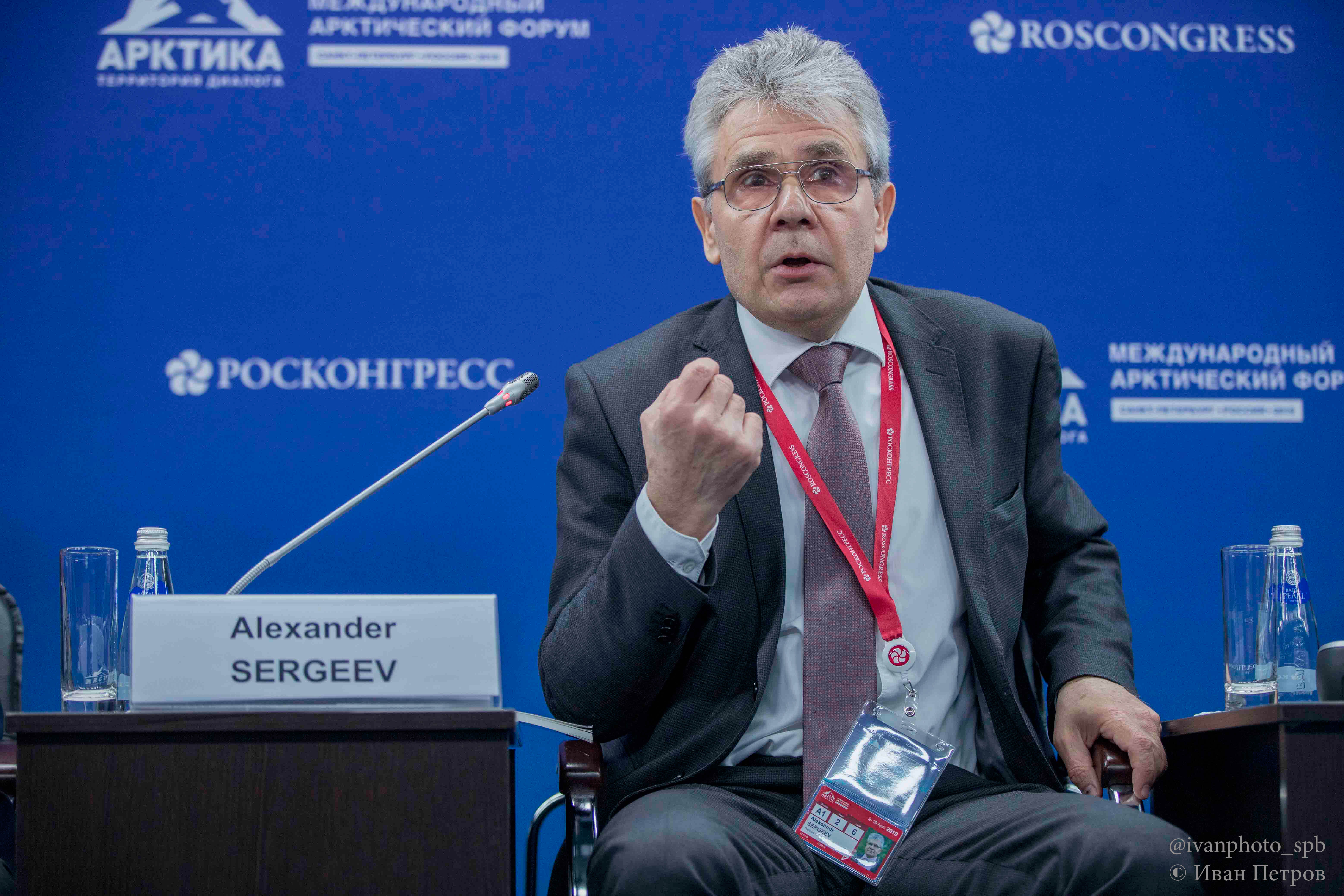 Александр Сергеев на Международном Арктическом форуме в Петербурге (2019)